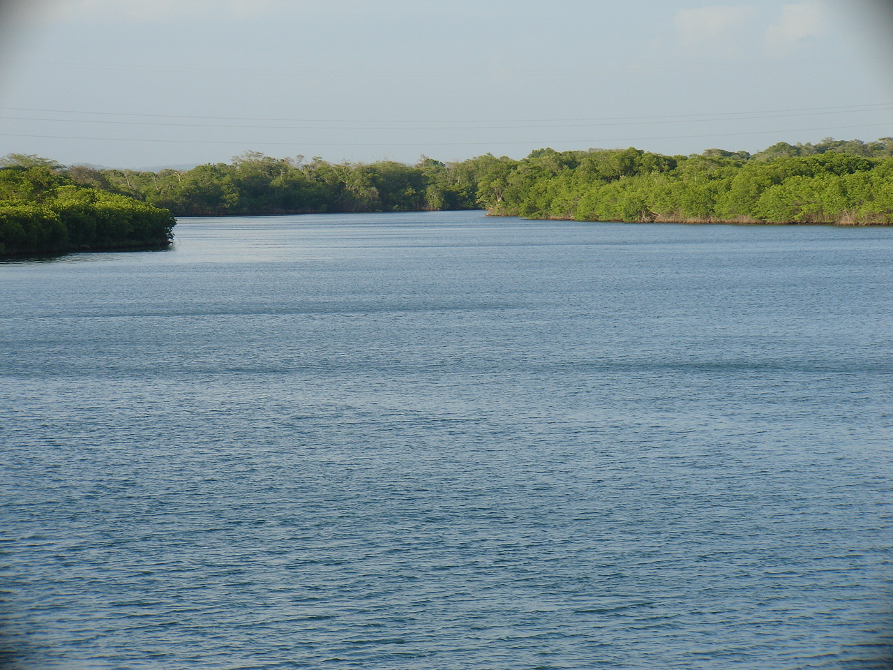 Desembocadura del río Champotón.